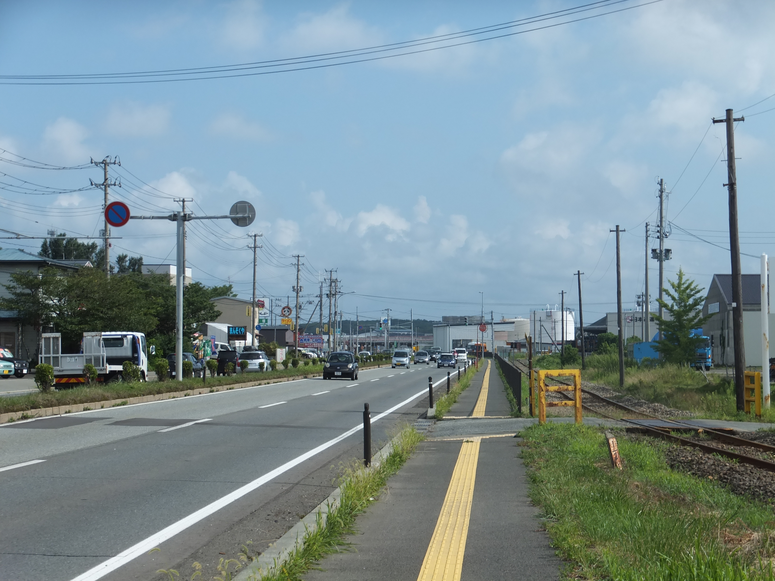 国道7号秋田北バイパス（秋田臨海バイパス）。港大橋以北では秋田臨海鉄道南線の線路と並行する。